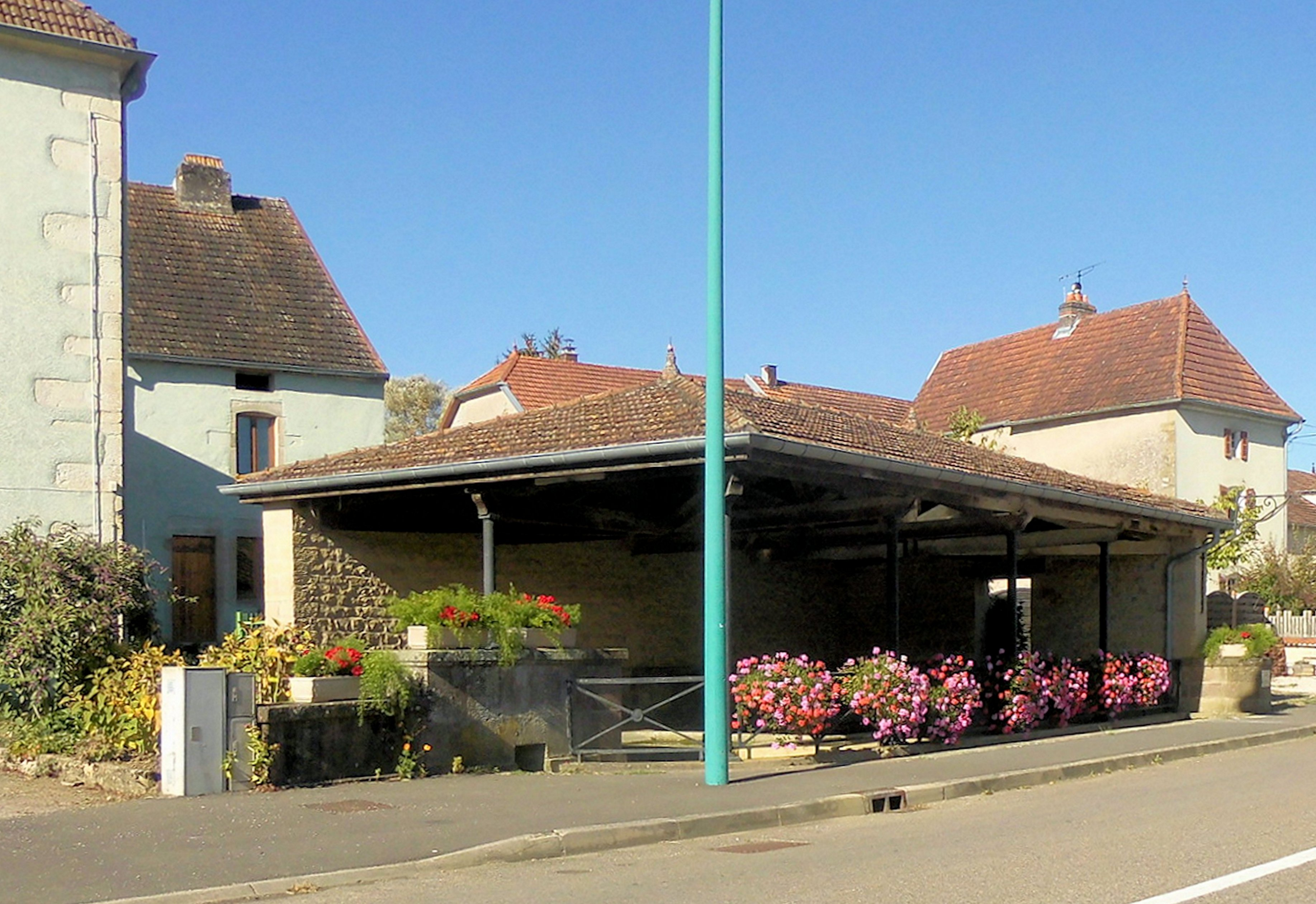 Lavoir de Menoux